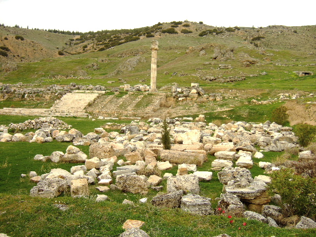 Hierapolis